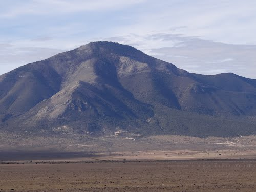 Sierra Catana en Saltillo